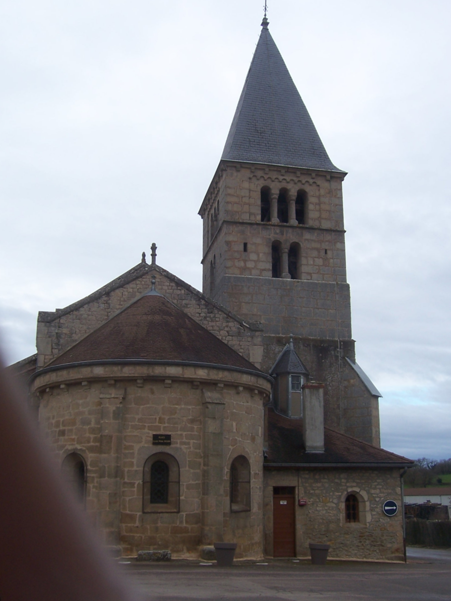 Eglise de Vendenesse-lès-Charolles